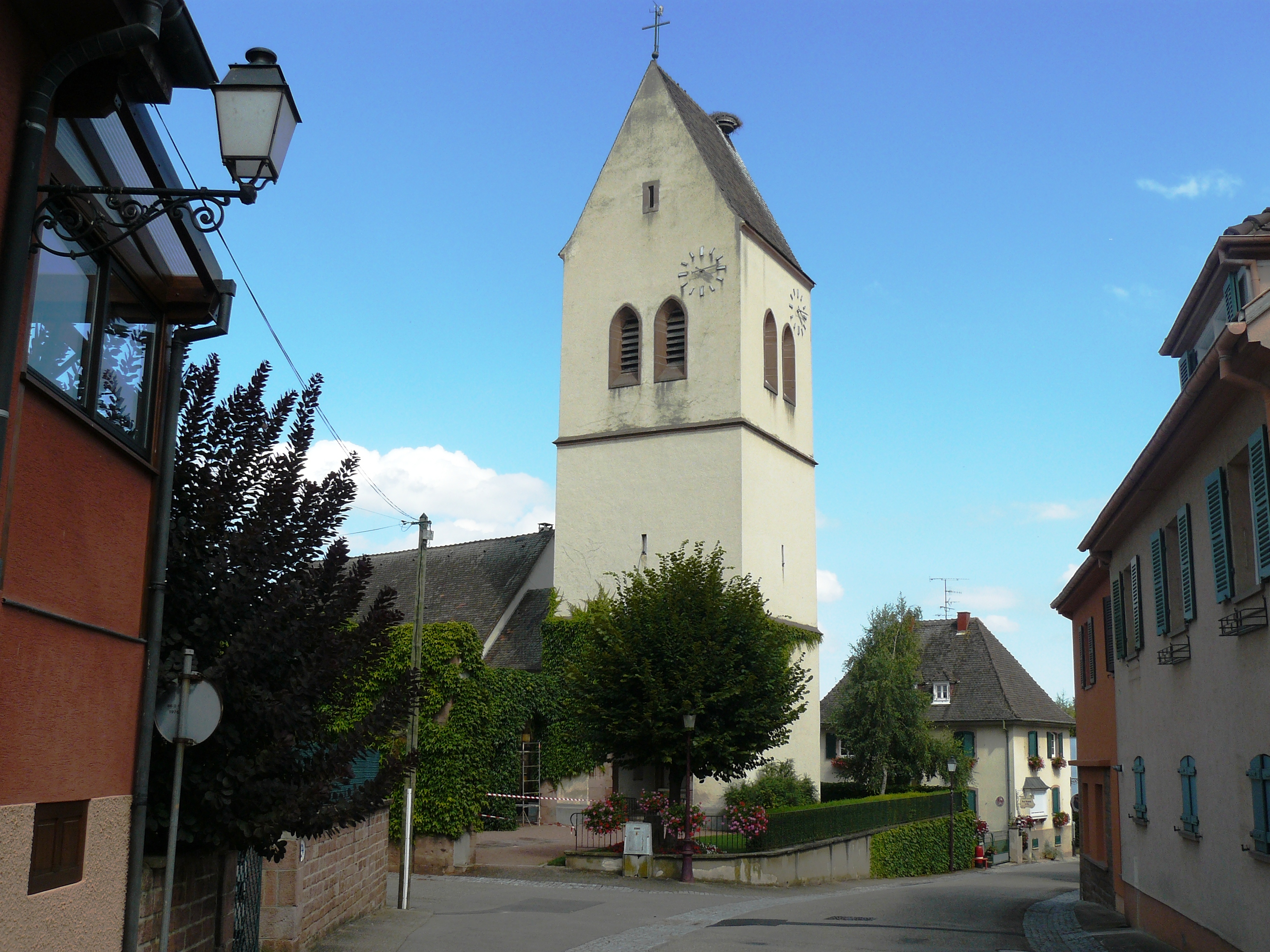 Église Sainte-Catherine [catholique et protestante]